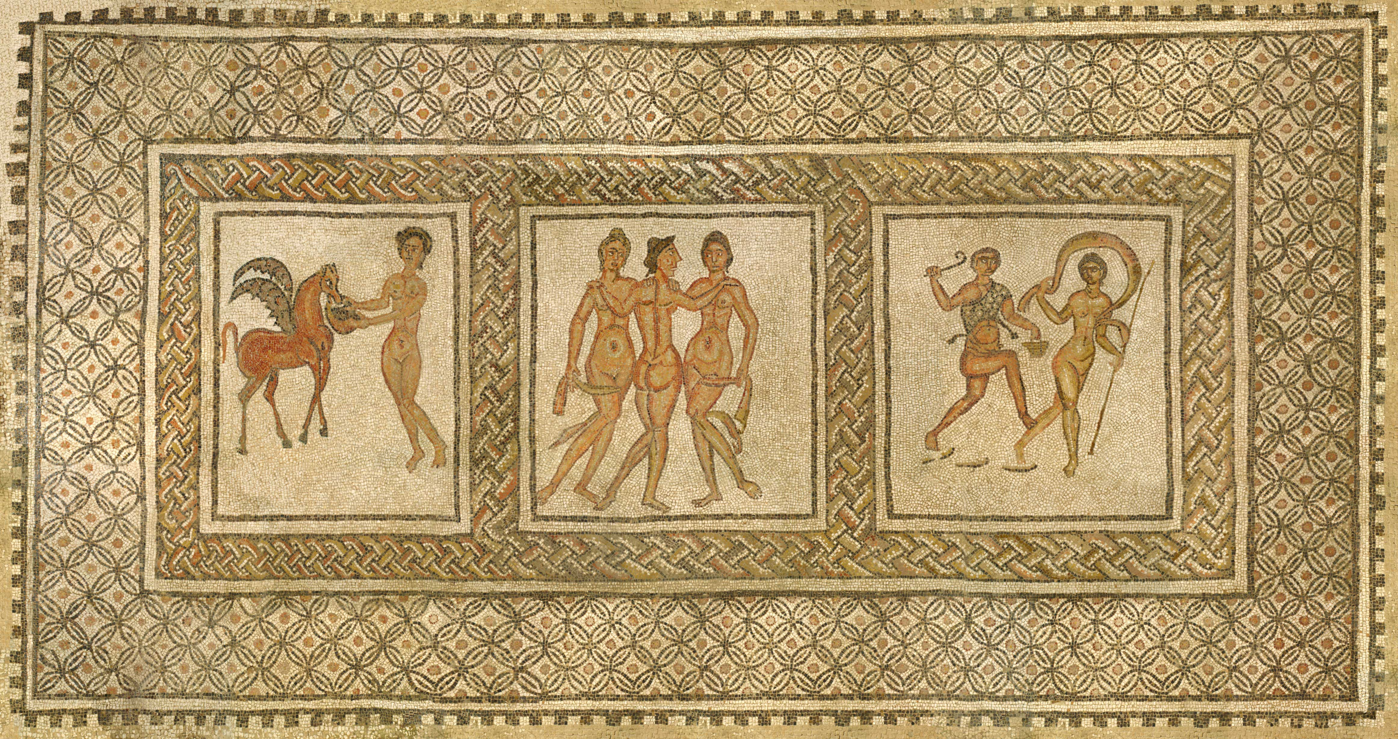 Mosaico situado en la entrada del oeucos de la villa romana de Fuente Álamo.